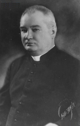 Ksiądz Marceli Ślepicki